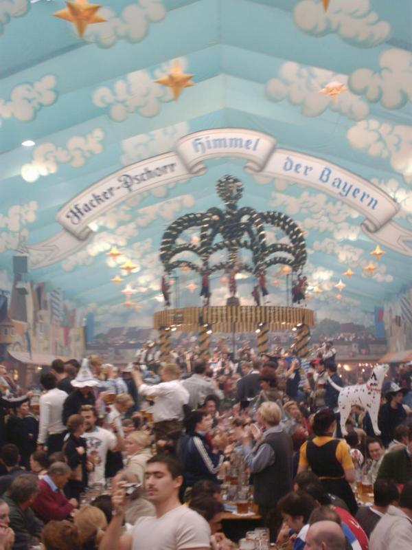 Photo de la fête de la Bière 2003